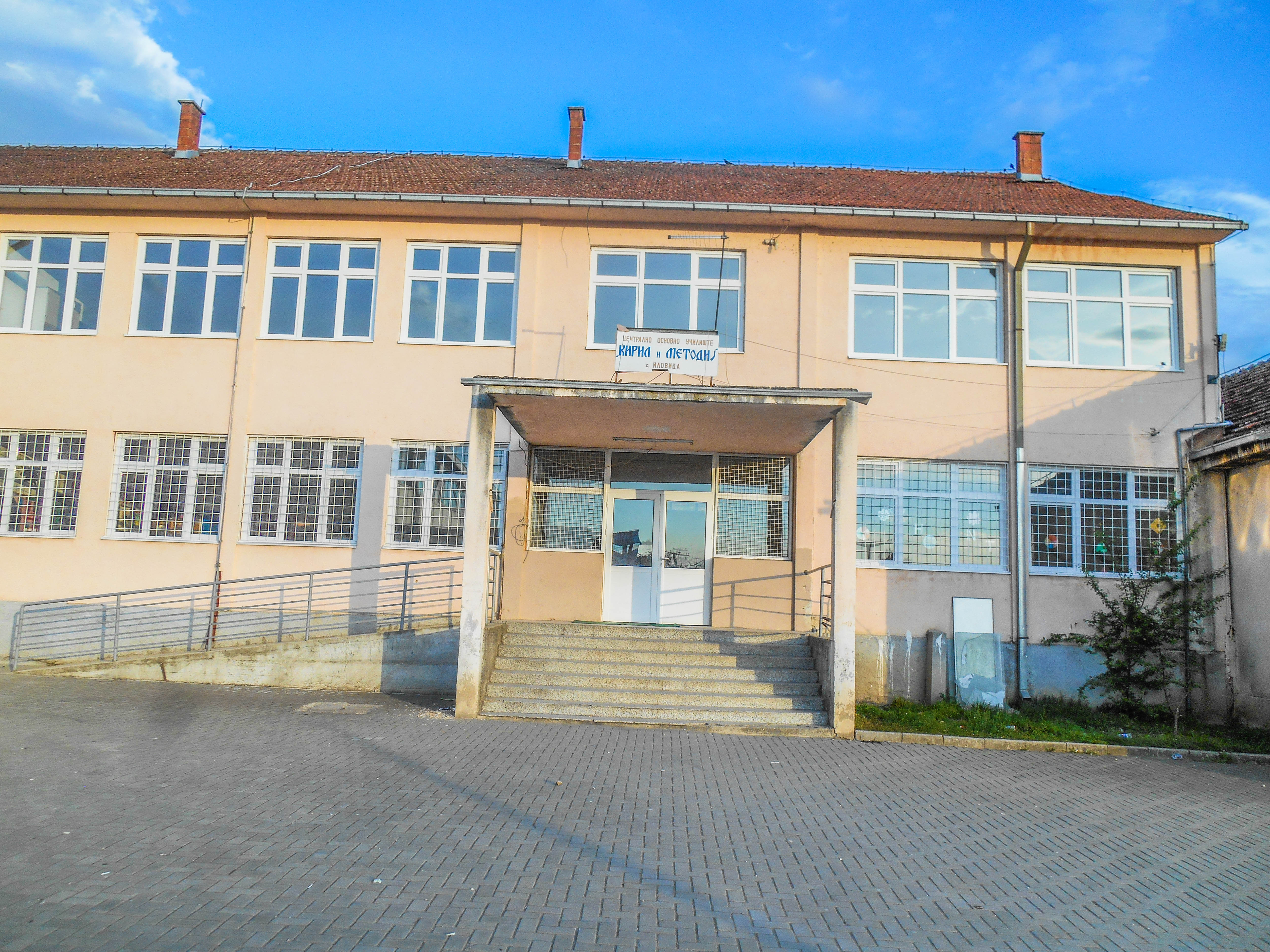 Основно училиште „Св. Кирил и Методиј“ - Иловица